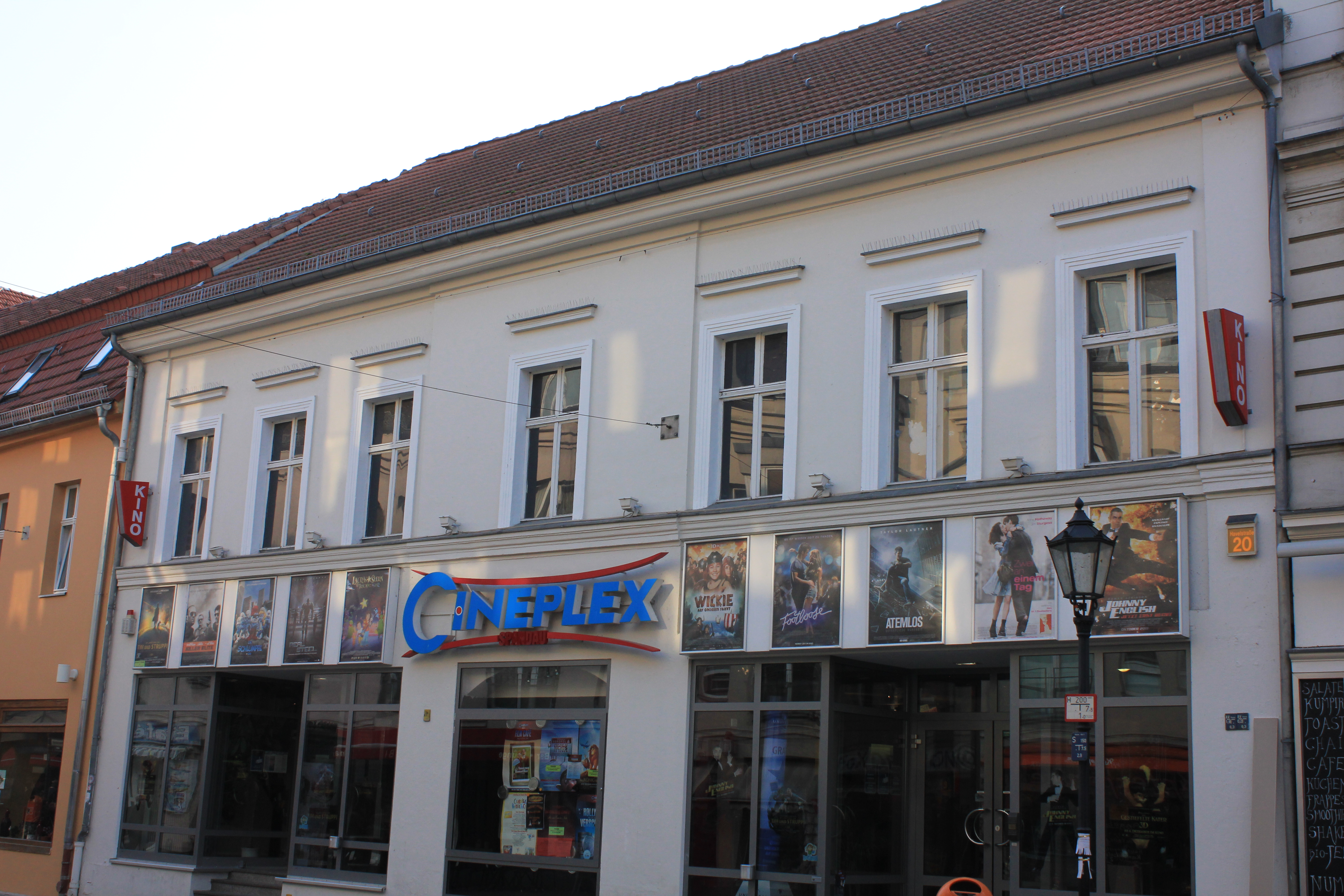 Wohnhaus, 1. Hälfte 19. Jh.